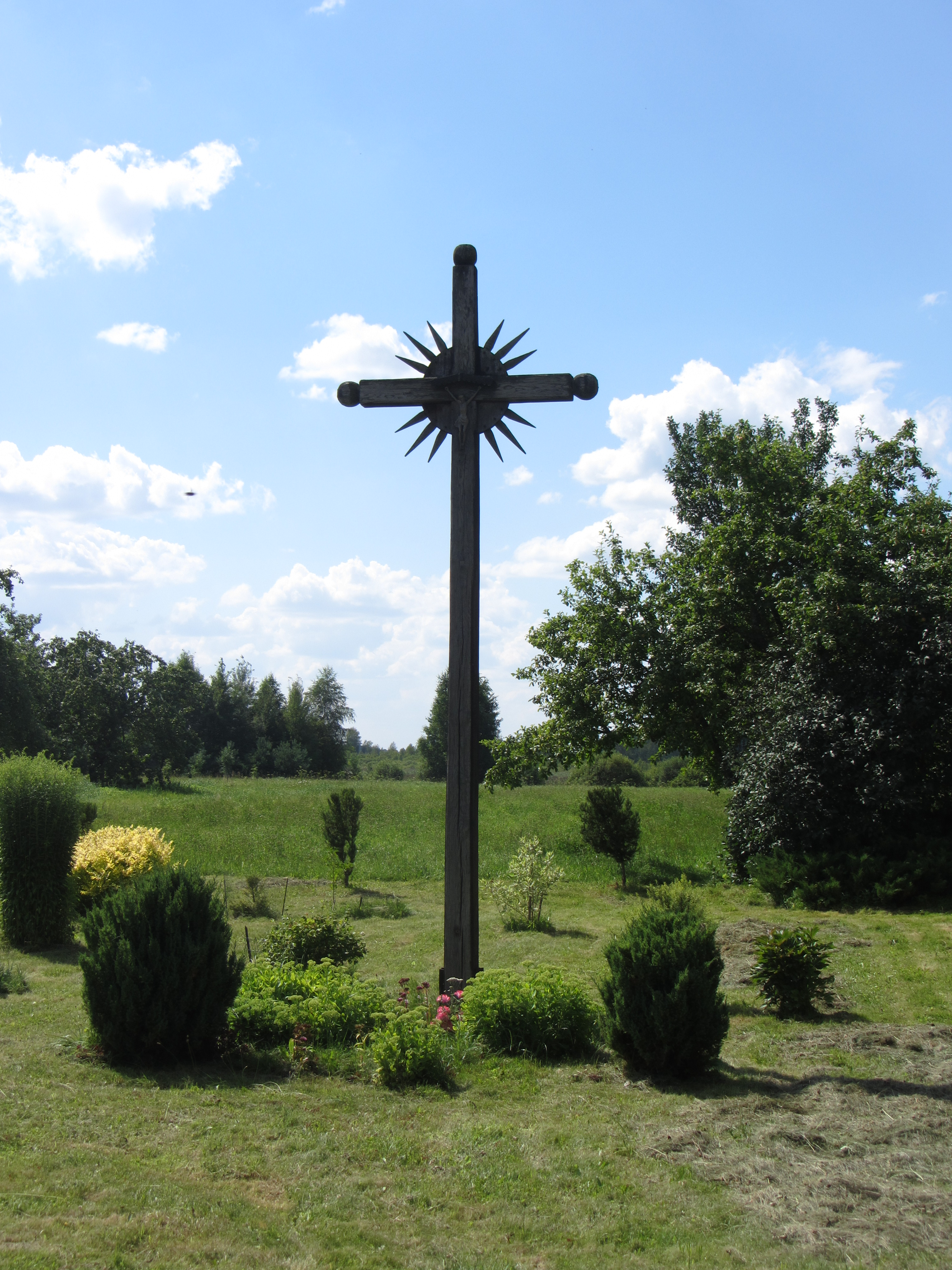 Stavarygala 19216, Lithuania